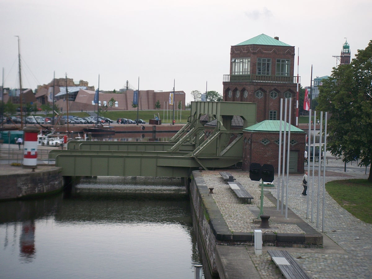 Klappbrücken Neuer Hafen